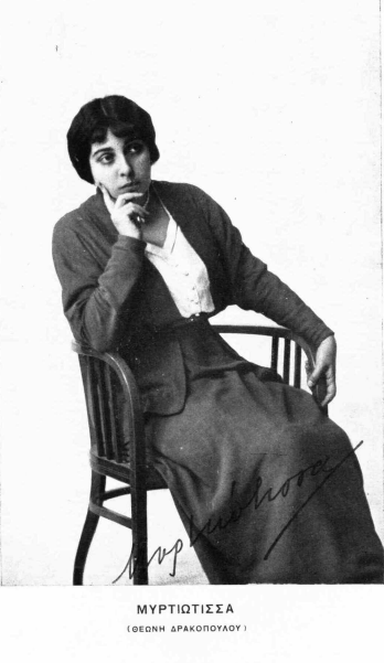 Fotografía de Myrtiotisa en Γράμματα, 28-30, página 252a, 1916